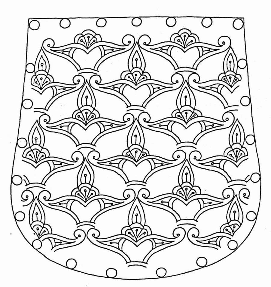 Eperjeske tarsolylemeze